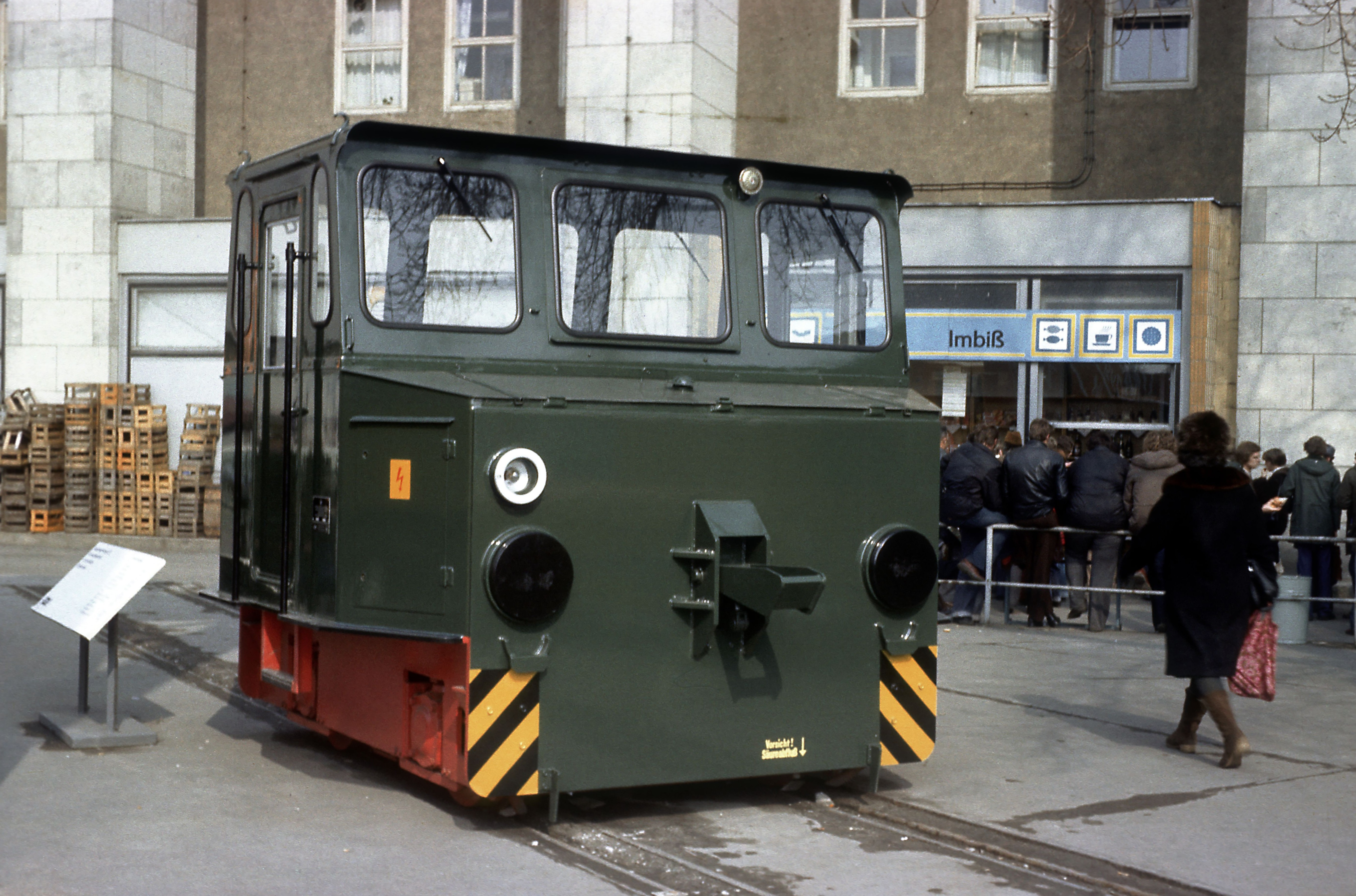 Von LEW Hennigsdorf erbautes Elektro-Schleppfahrzeug mit Batterie-Antrieb der Baureihe EL 16. Damit werden Fahrzeuge auf nicht fahrleitungsüberspannten Gleisen im Bahnbetriebswerk bewegt. Fotografiert auf der Leipziger Frühjahrsmesse 1979